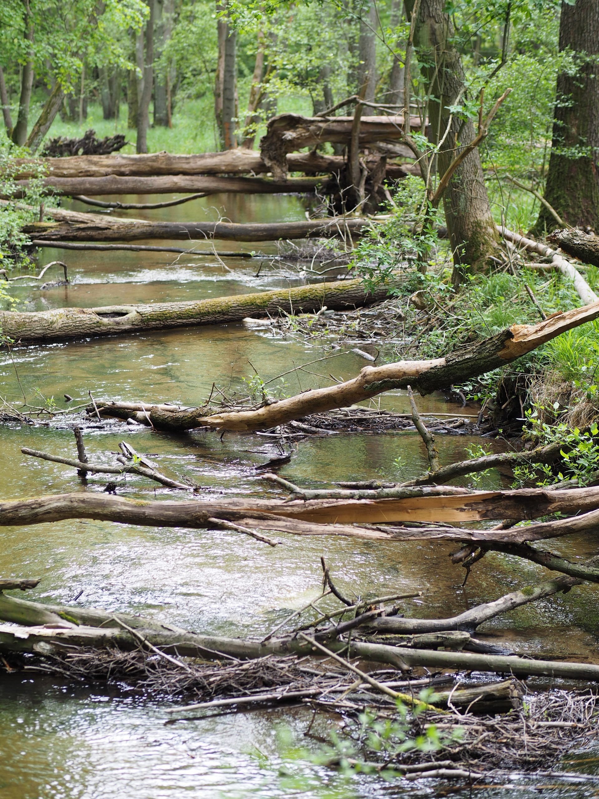 Am Stobber in Naturschutzgebiet Stobbertal